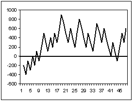 Backtest van een tradingstrategie in Excel. X-as: tradenummer. Y-as: totale waarde van de beleggingsrekening